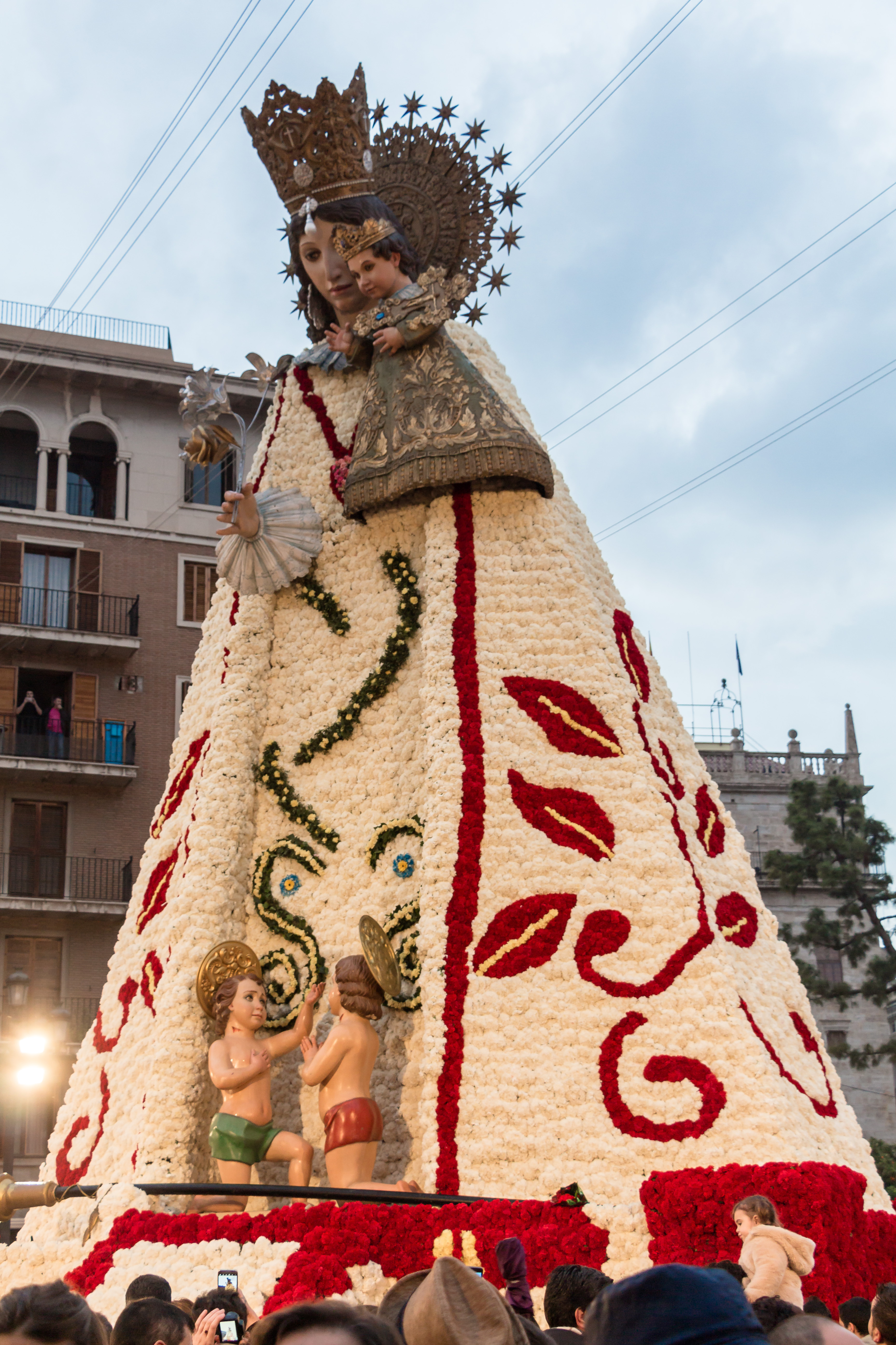 Imagen del manto de flores en la figura de la Virgen de los Desamparados que se elabora durante la Ofrenda This is a photography of a Folklore festival in Spain (Wikidata id Q1143768).